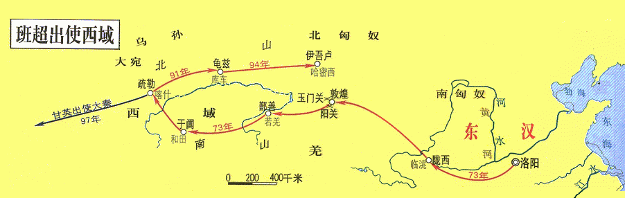 東漢班超出使西域行程圖。